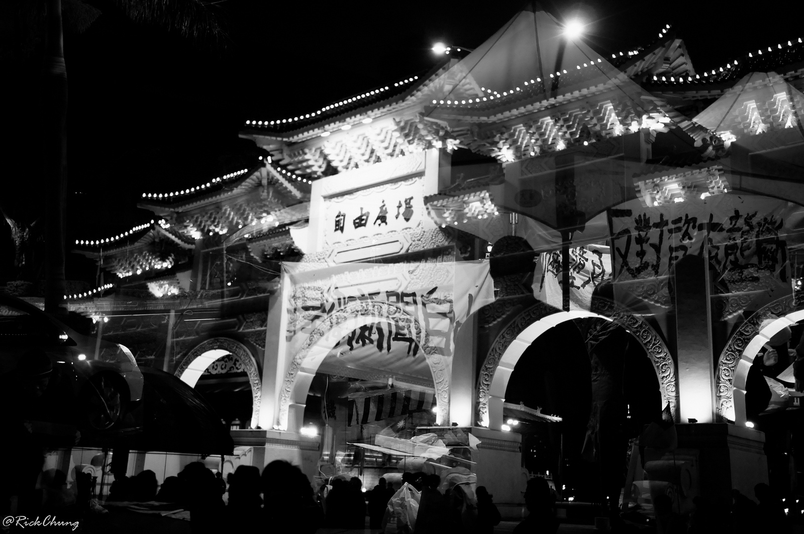 2012年12月31日 反媒體巨獸行動